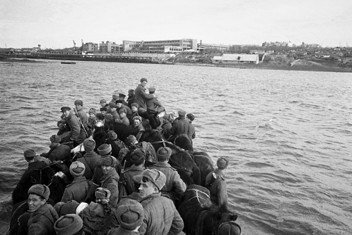 Советские пехотинцы и кавалеристы переправляются в Херсон. Кадр 1